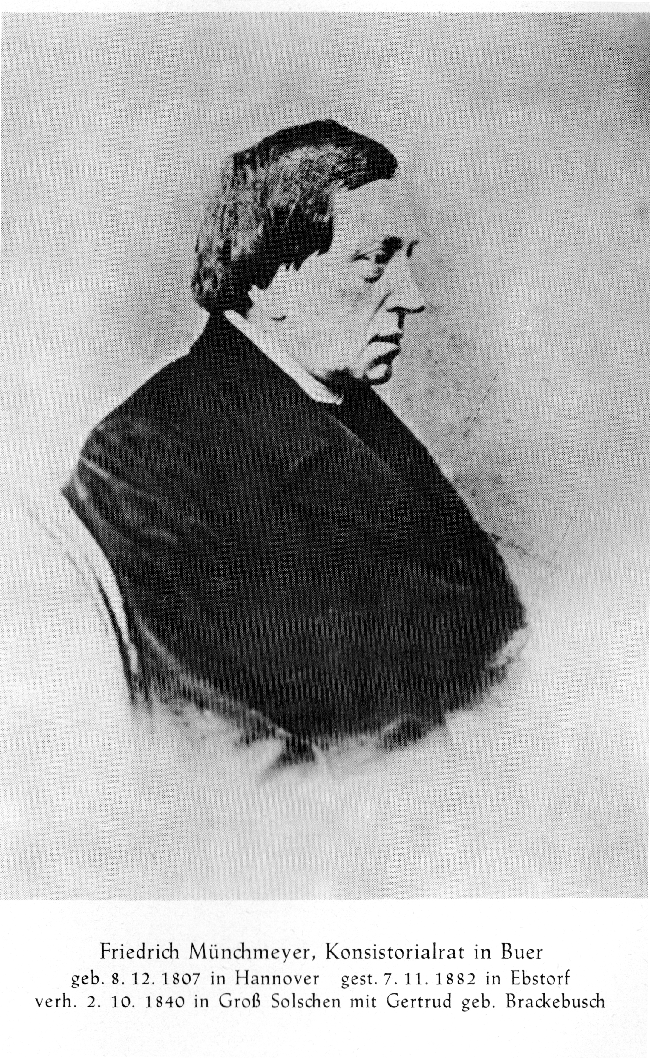 August Friedrich Otto Münchmeyer genannt Fritz, Konsistorialrat (1807-1882)